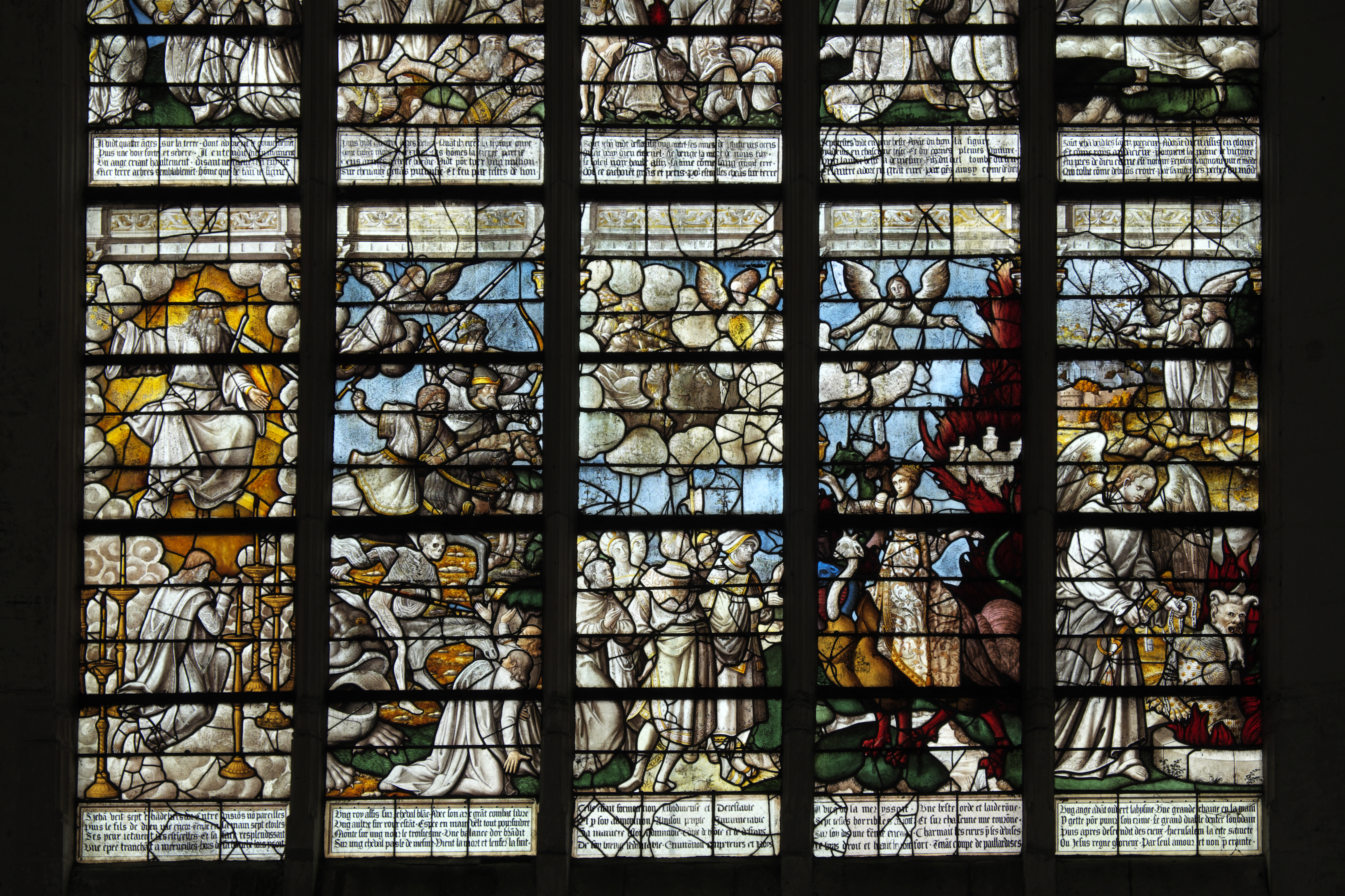 Katholische Kirche Saint-Georges in Chavanges im Département Aube (Champagne-Ardenne/Frankreich), Bleiglasfenster aus dem 16. Jahrhundert, Darstellung: Apokalypse (Ausschnitt).